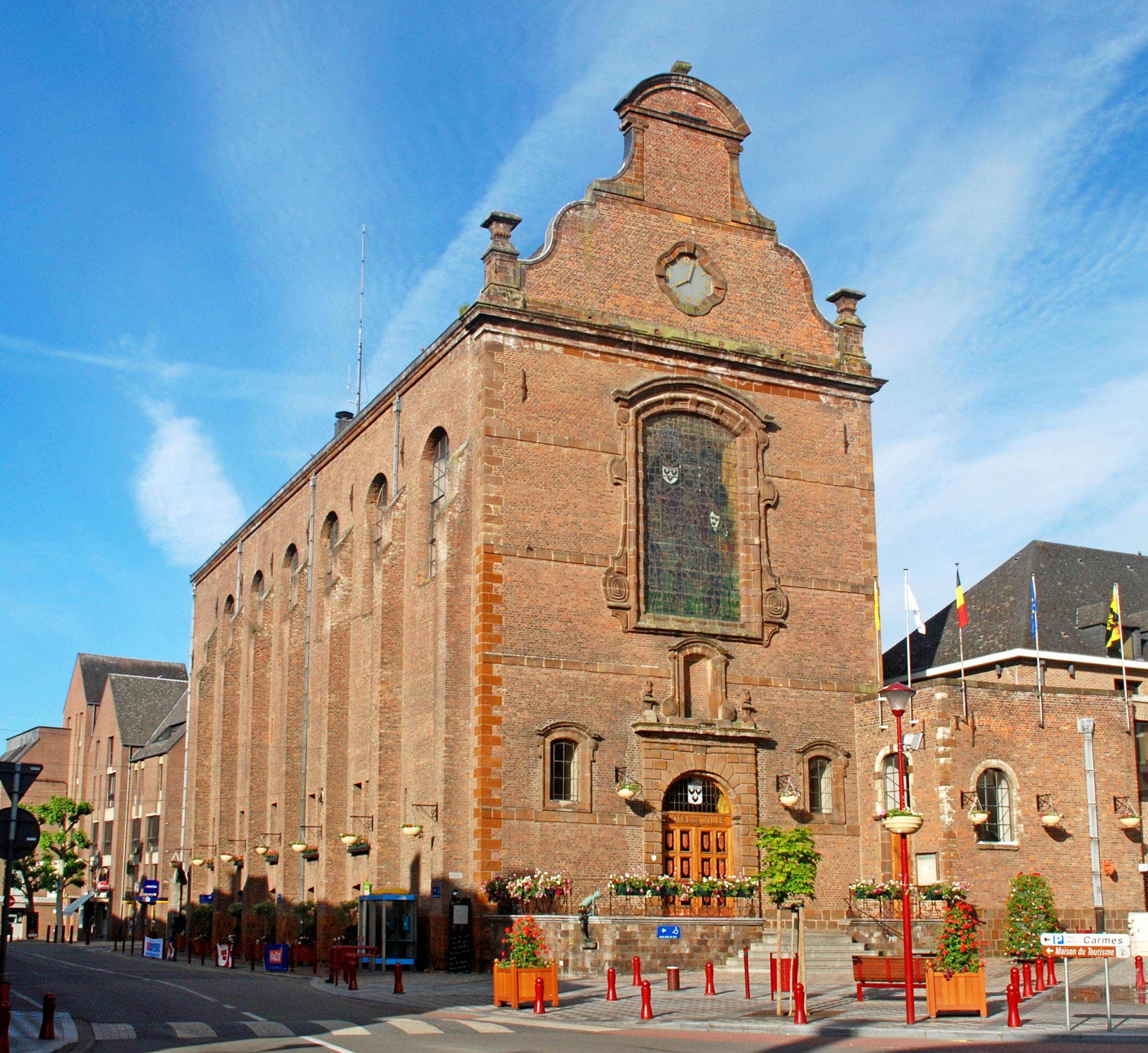 Belgique - Wallonie - Wavre - Ancien couvent des Carmes Chaussés (actuel hôtel de ville)